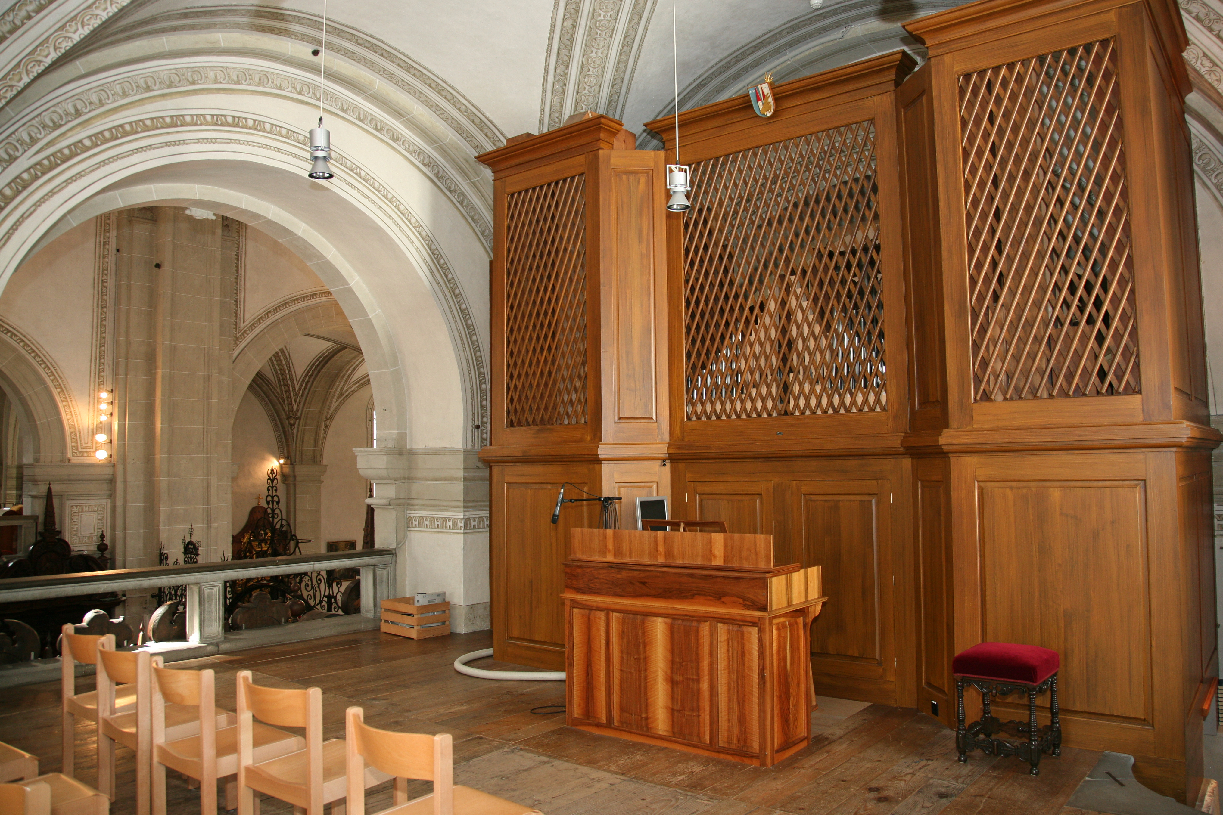 Walpenempore mit Walpenorgel